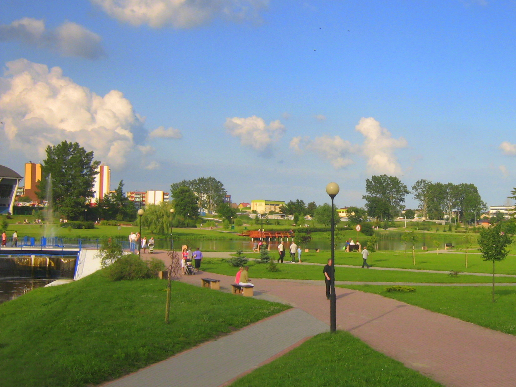 Park w Zambrowie